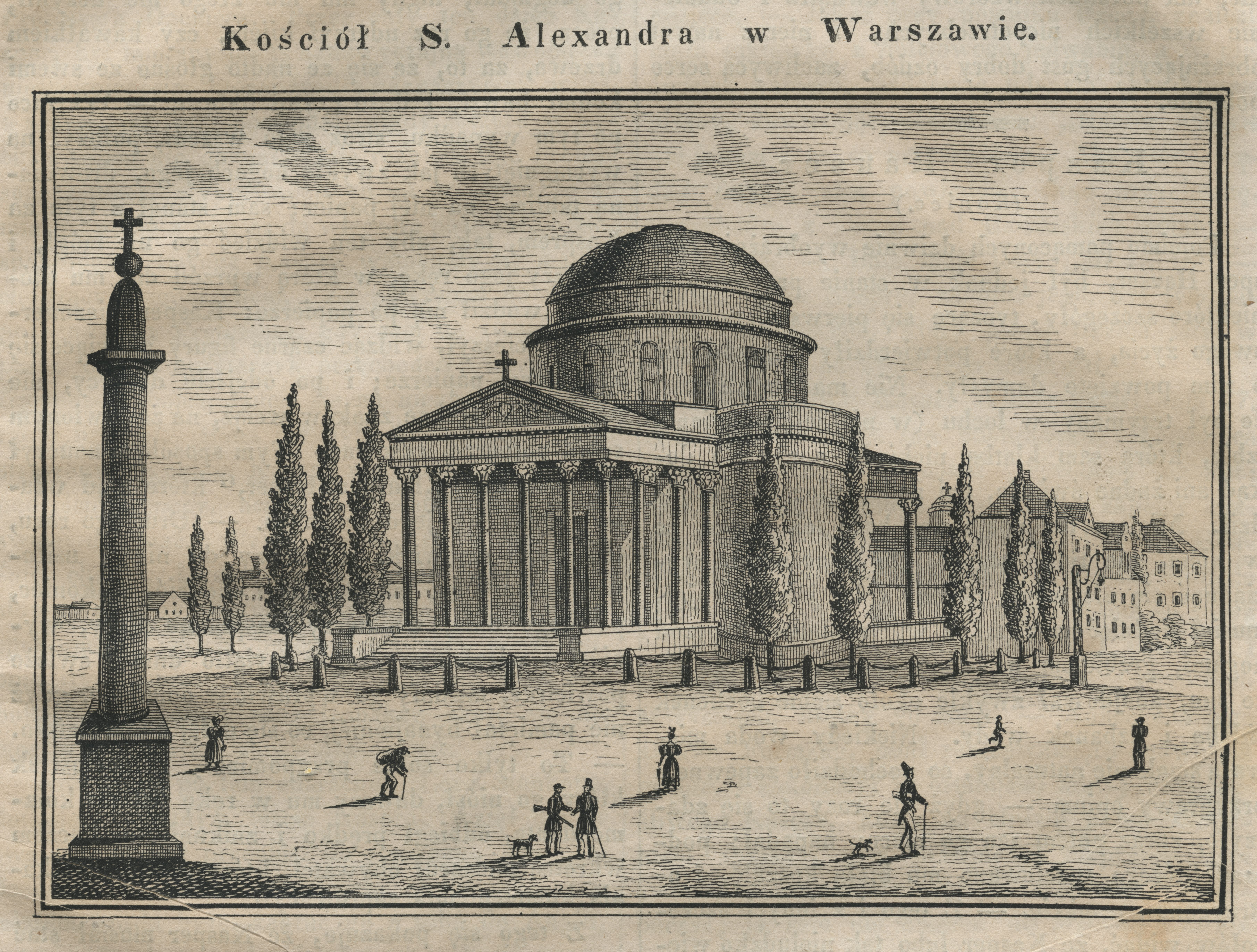 Kościół ś. Aleksandra w Warszawie